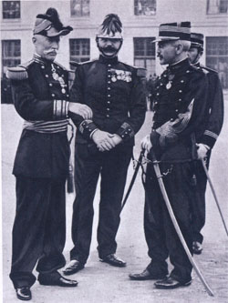 Réhabilitation de Dreyfus - affaire Dreyfus. À droite, le commandant Alfred Dreyfus, réhabilité aux Invalides, s'entretient avec le général Gillain. Au centre, le commandant Targe, enquêteur et découvreur de nombreux faux.